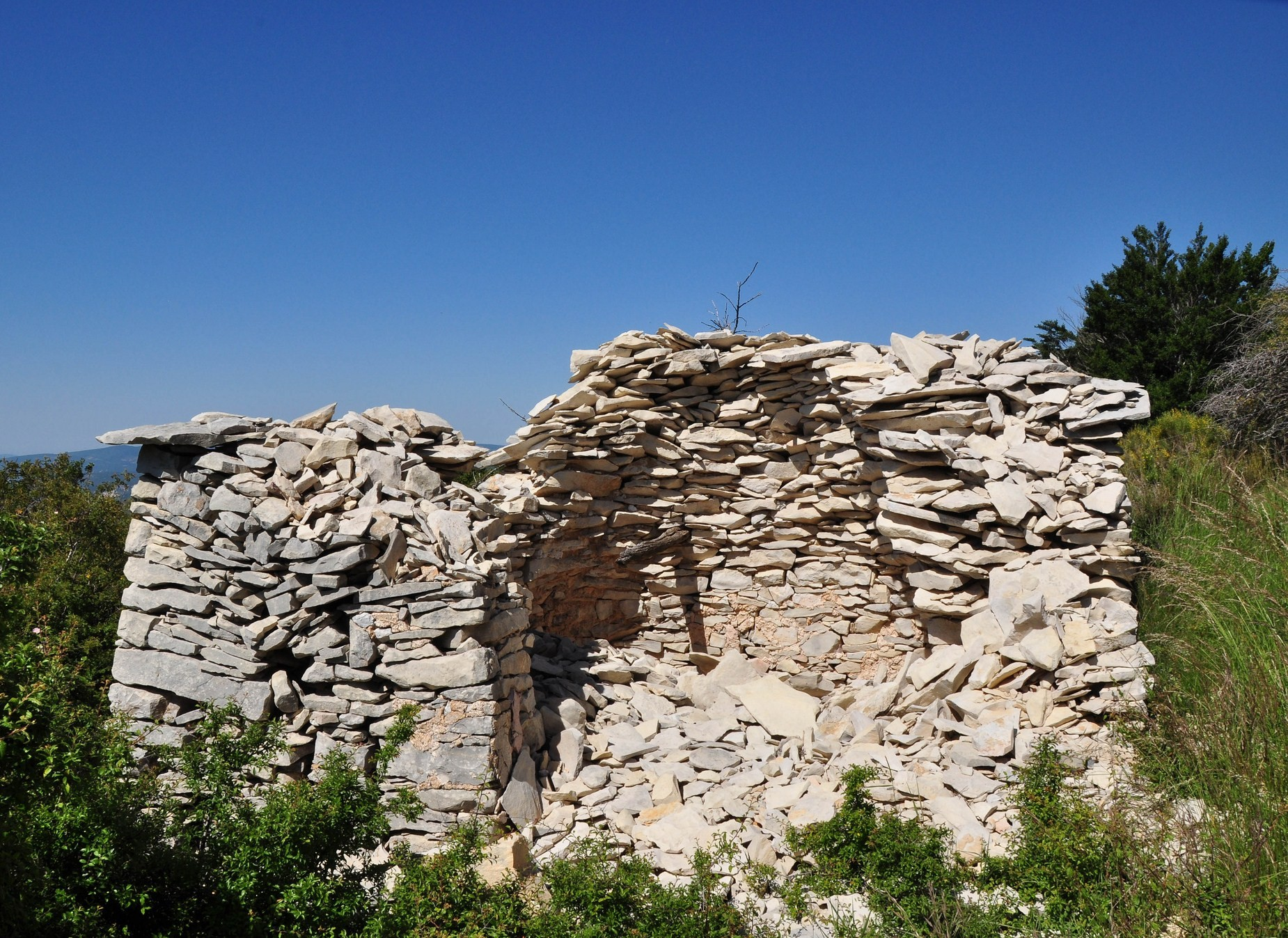 Cabanon pointu, de plan carré, en ruines entre l'Hospitalet et Lardiers (Alpes-de-Haute-Provence)